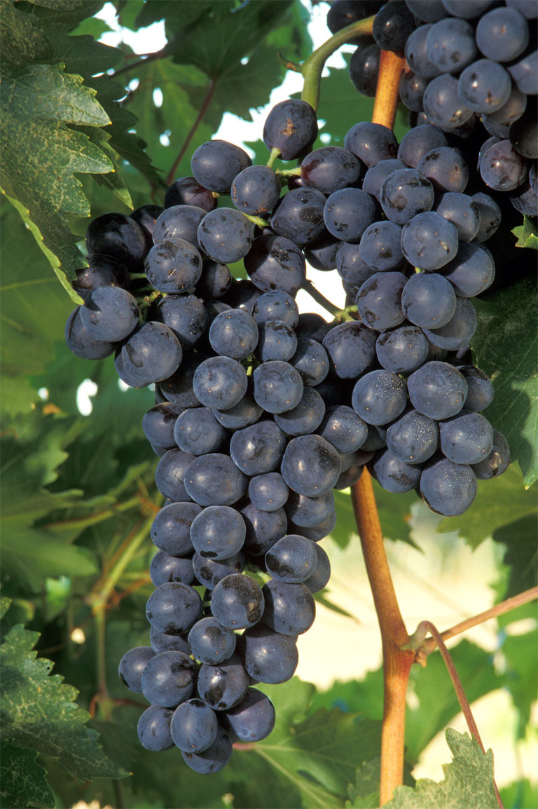 Public Domain, U.S. Department o Agriculture — Agricultural Research Service